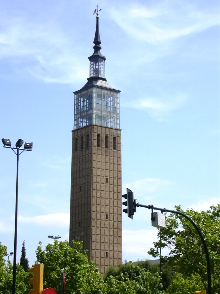 Torre de la antigua feria de muestras - Zaragoza